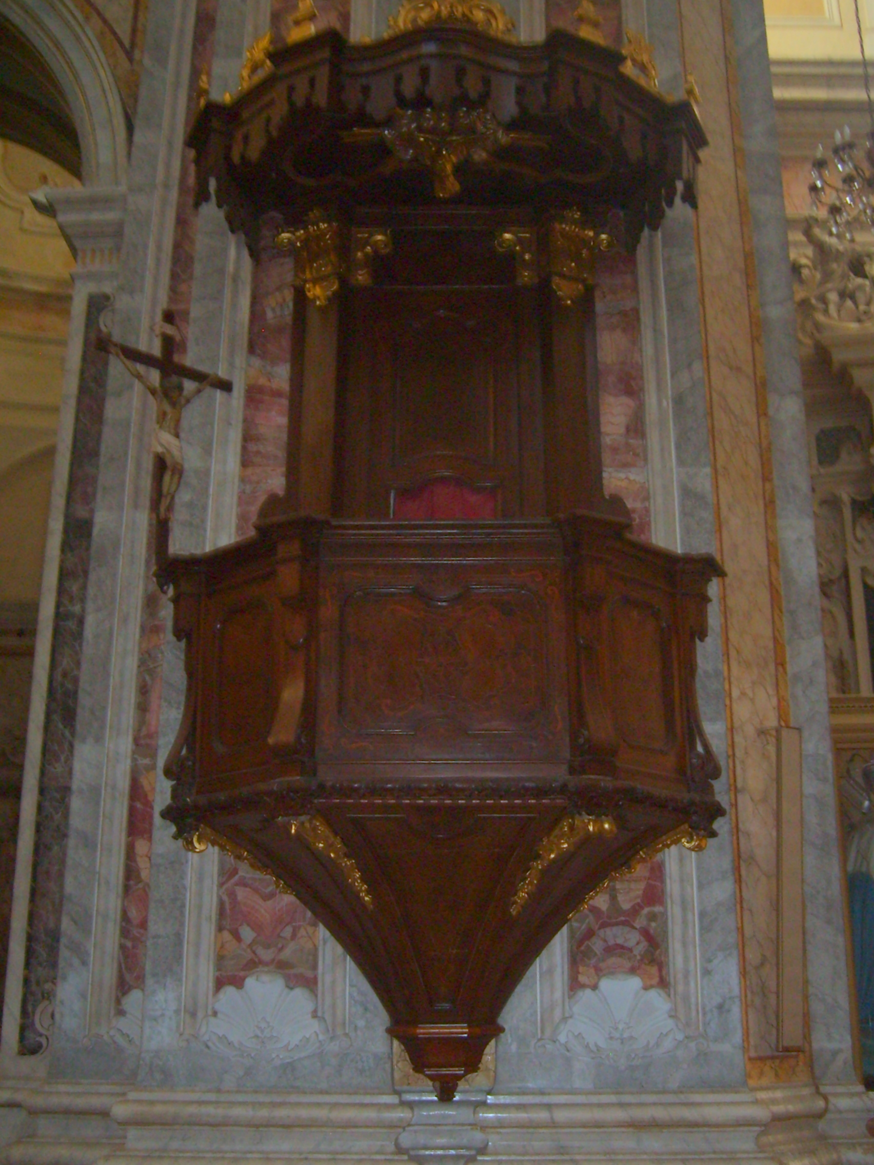 Pulpito della chiesa matrice di Francavilla Fontana